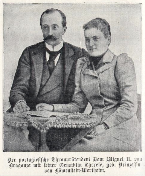 Herzog Miguel II. von Braganza und Ehefrau Maria Theresa Prinzessin zu Löwenstein-Wertheim-Rosenberg